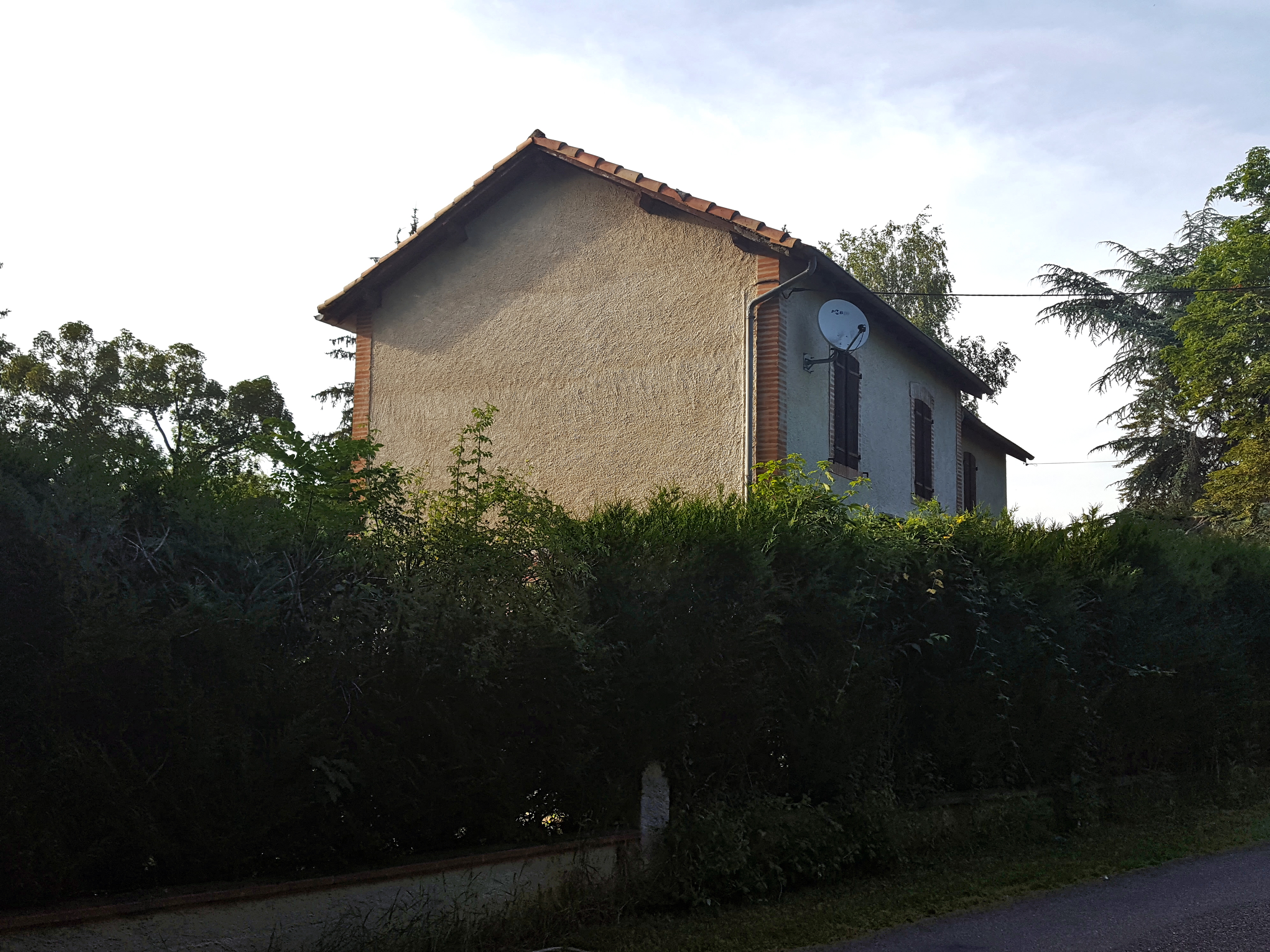 Ancienne gare de Molières en Tarn-et-Garonne, en service de 1913 à 1933.